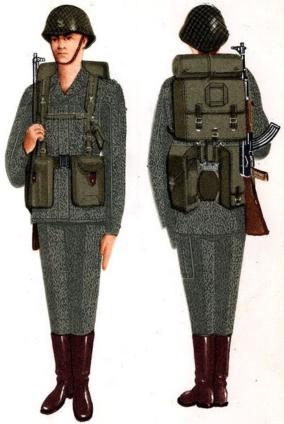 Ubiór ćwiczebny żołnierza zsw z pełnym oporządzeniem (wojska lądowe)